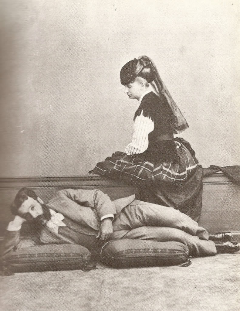 Los duques de Sesto, José Osorio y Silva y su mujer la princesa rusa Sofía Torubetzkoy